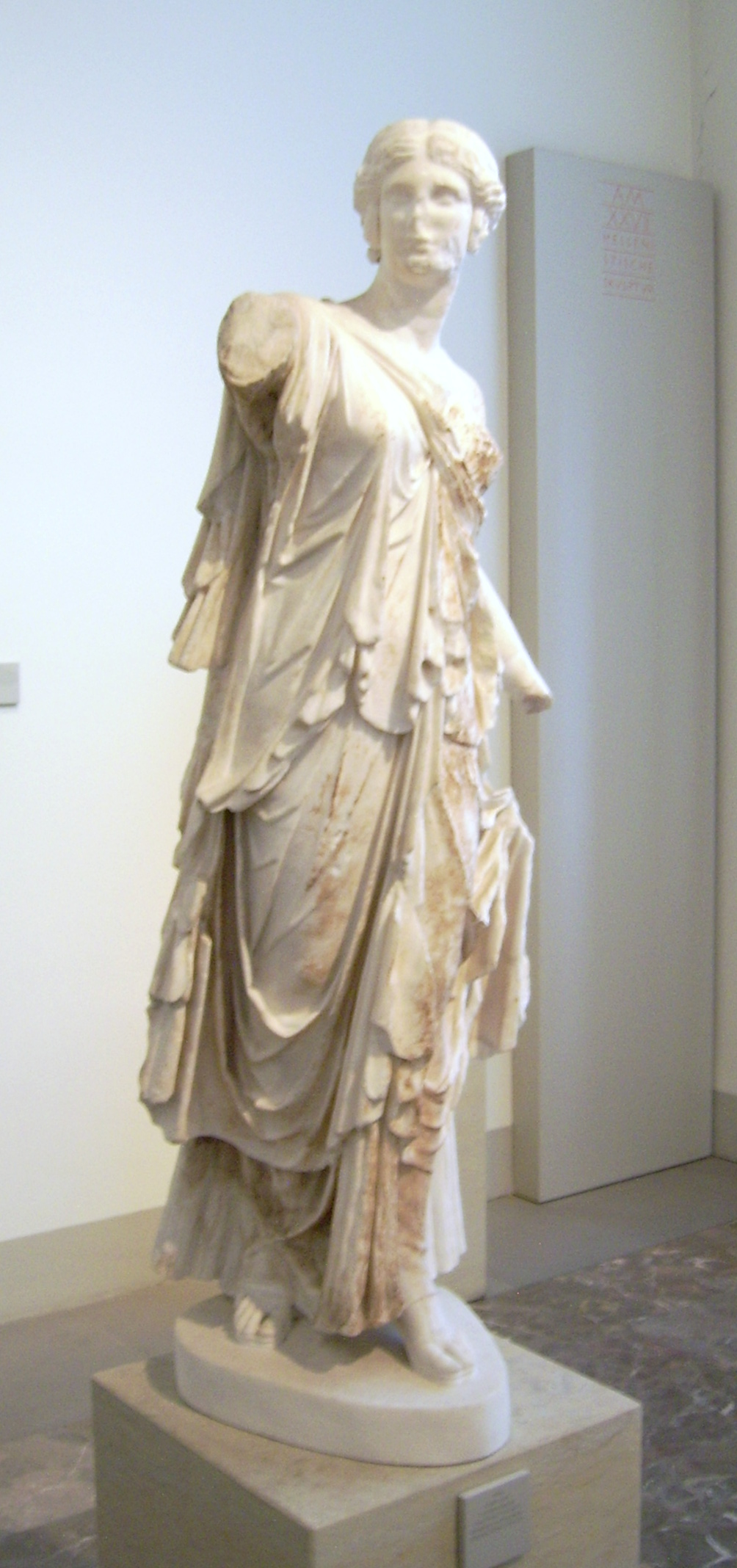 Mädchenfigur in archaischem Stil, sogenannte "Tänzerin". Aus einem Gelageraum in "Palast V" von Pergamon, gefunden im März 1886, weißer transparenter Marmor, Basis und Teile der Skulptur ergänzt, datiert um 150/125 v. Chr., Höhe 120cm, ohne Plinthe 114 cm, Kopf 14,5 cm